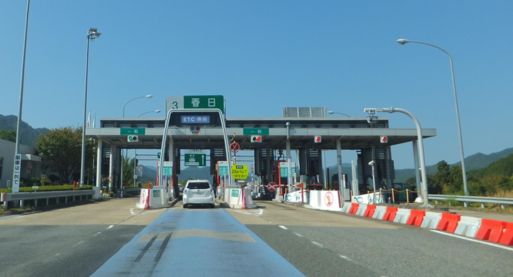 春日インターチェンジ